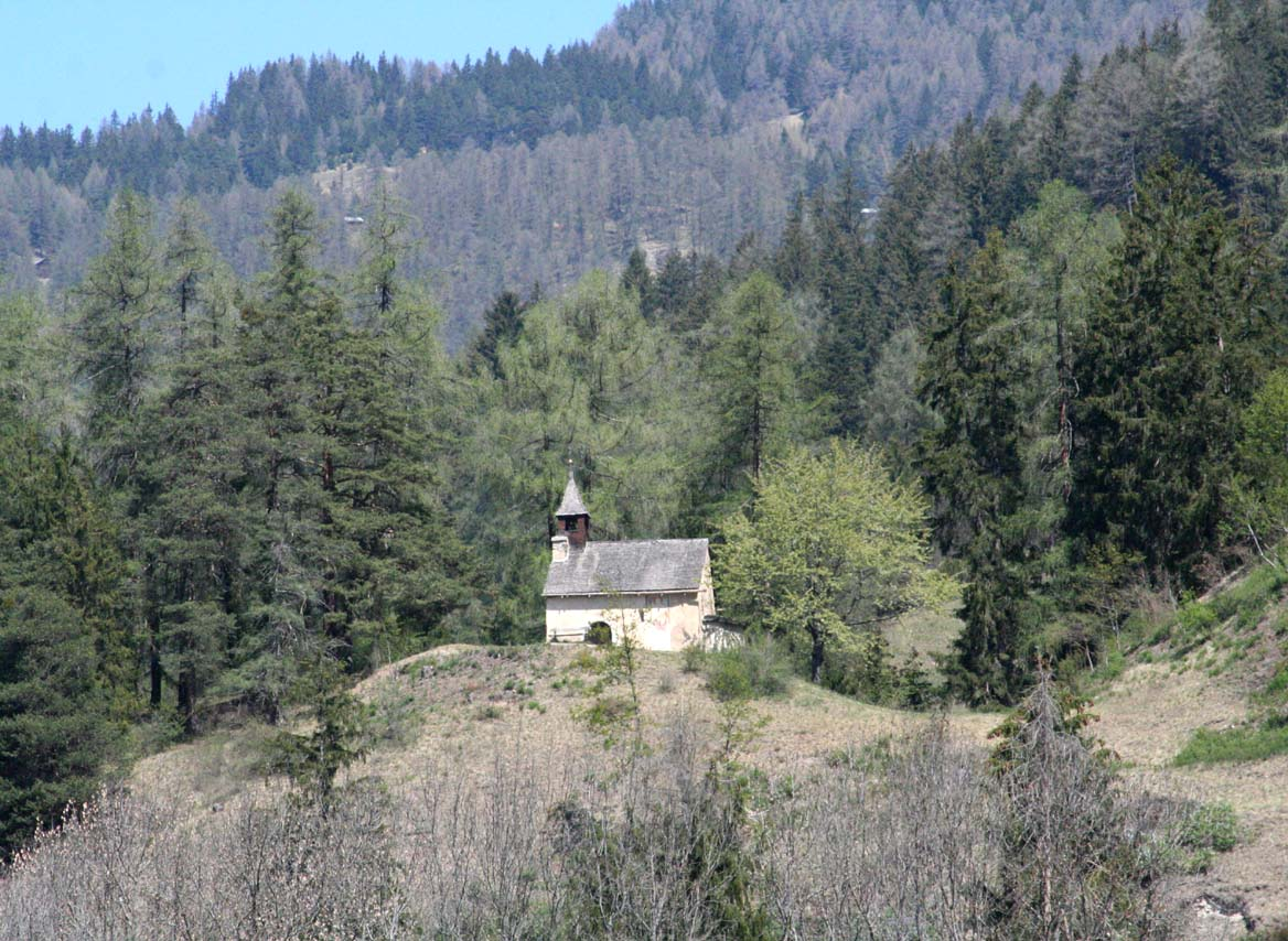 Kirche Maria Magdalena bei Paspels